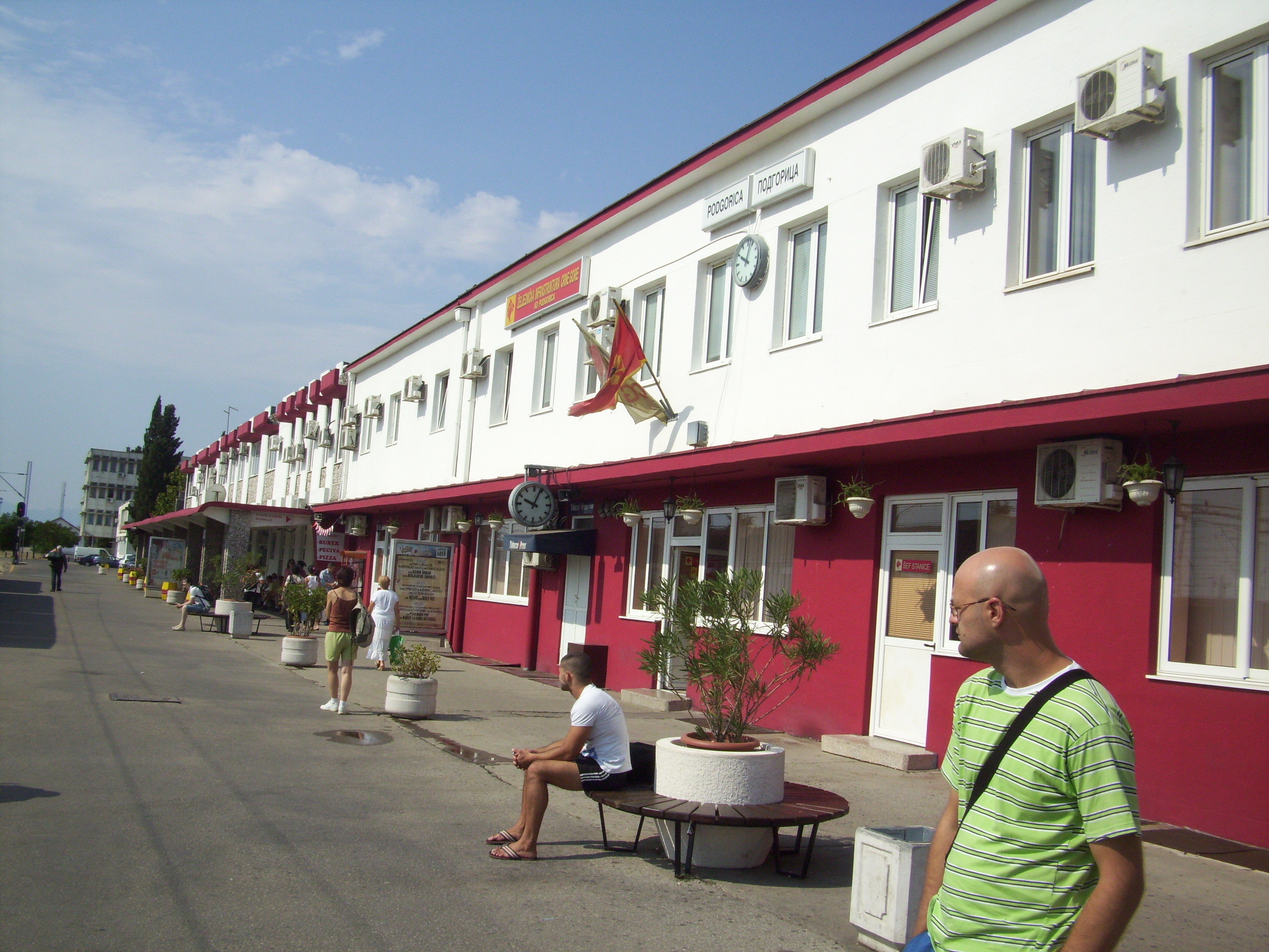 La stazione di Podgorica